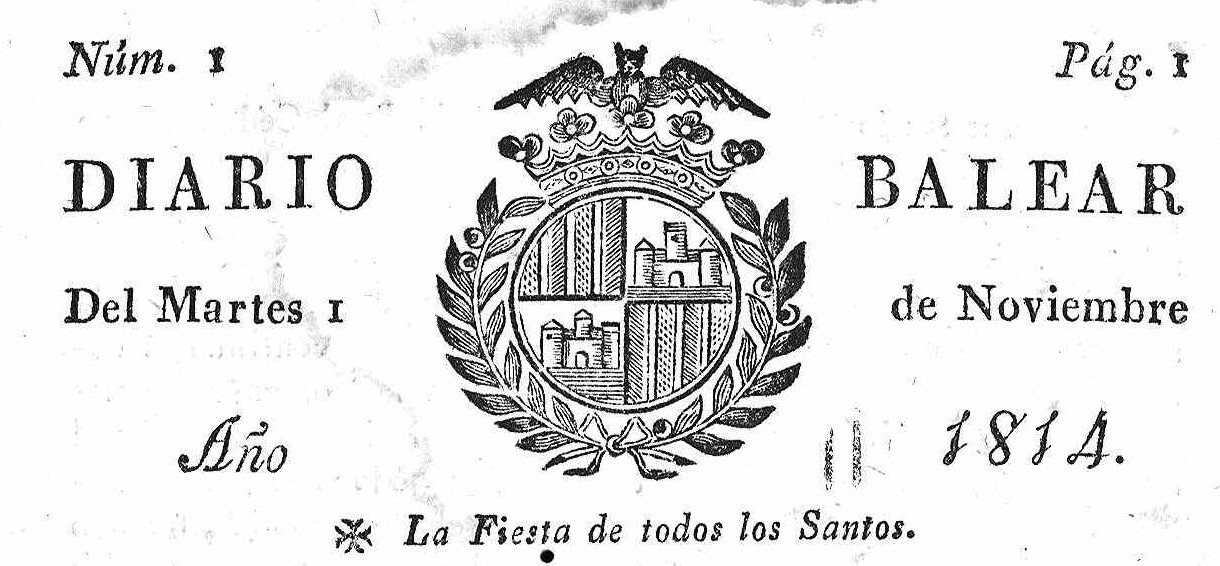 Cabecera del primer ejemplar del Diario Balear.